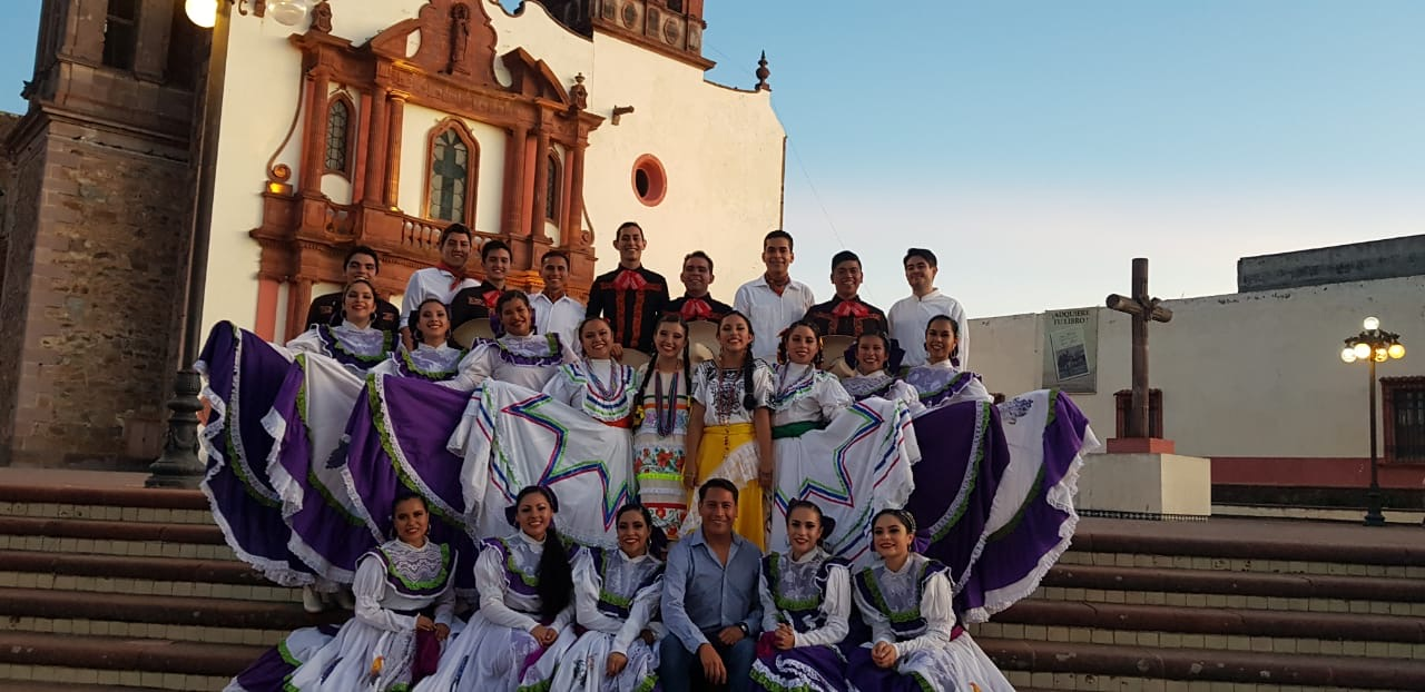 Después de la presentación por el aniversario de Amealco, el grupo representativo de baile folclórico posa frente a la parroquia de Santa María Amealco, en el estado de Querétaro, México.